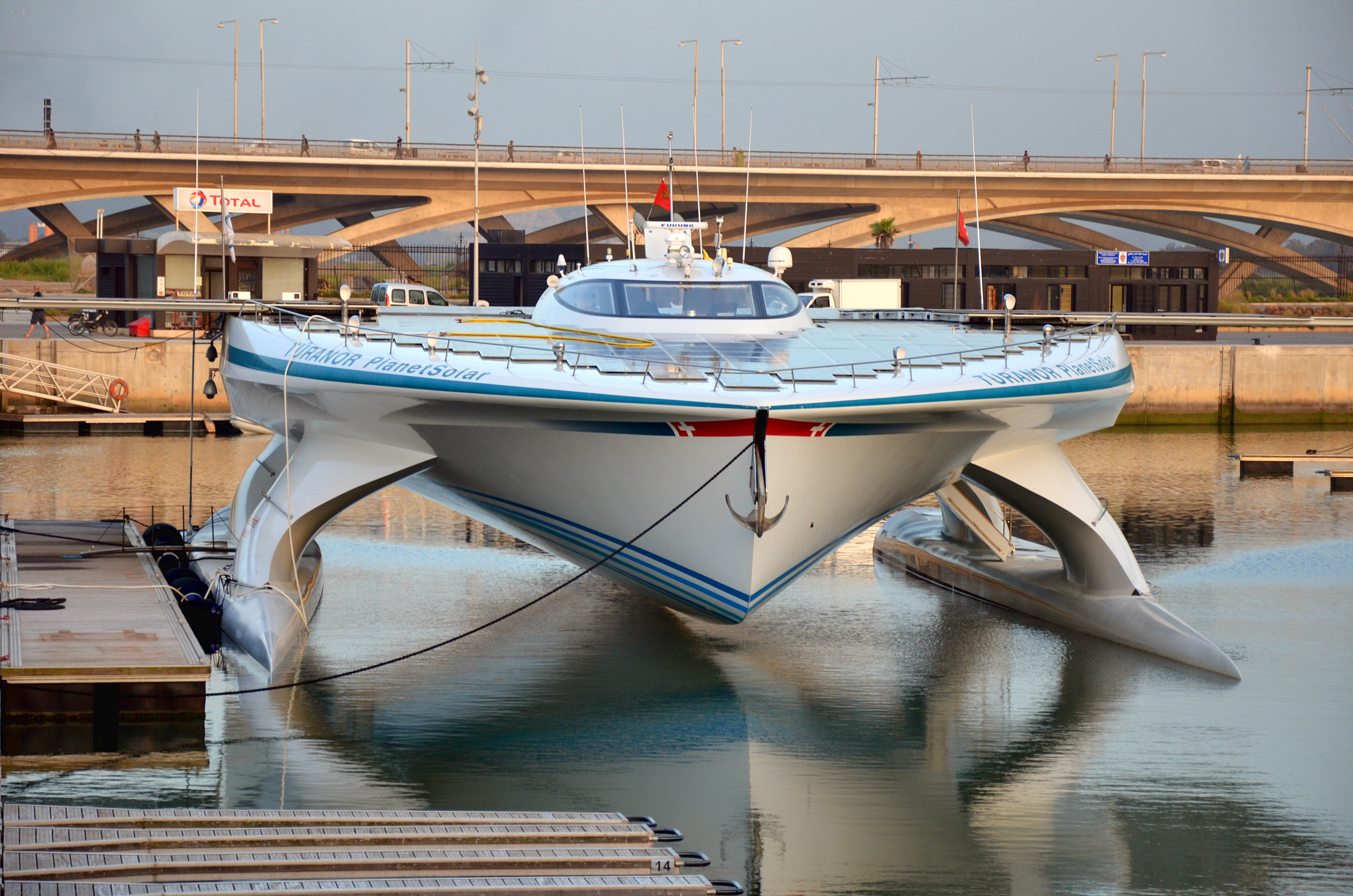 Tûranor PlanetSolar à la marina de Salé, Maroc